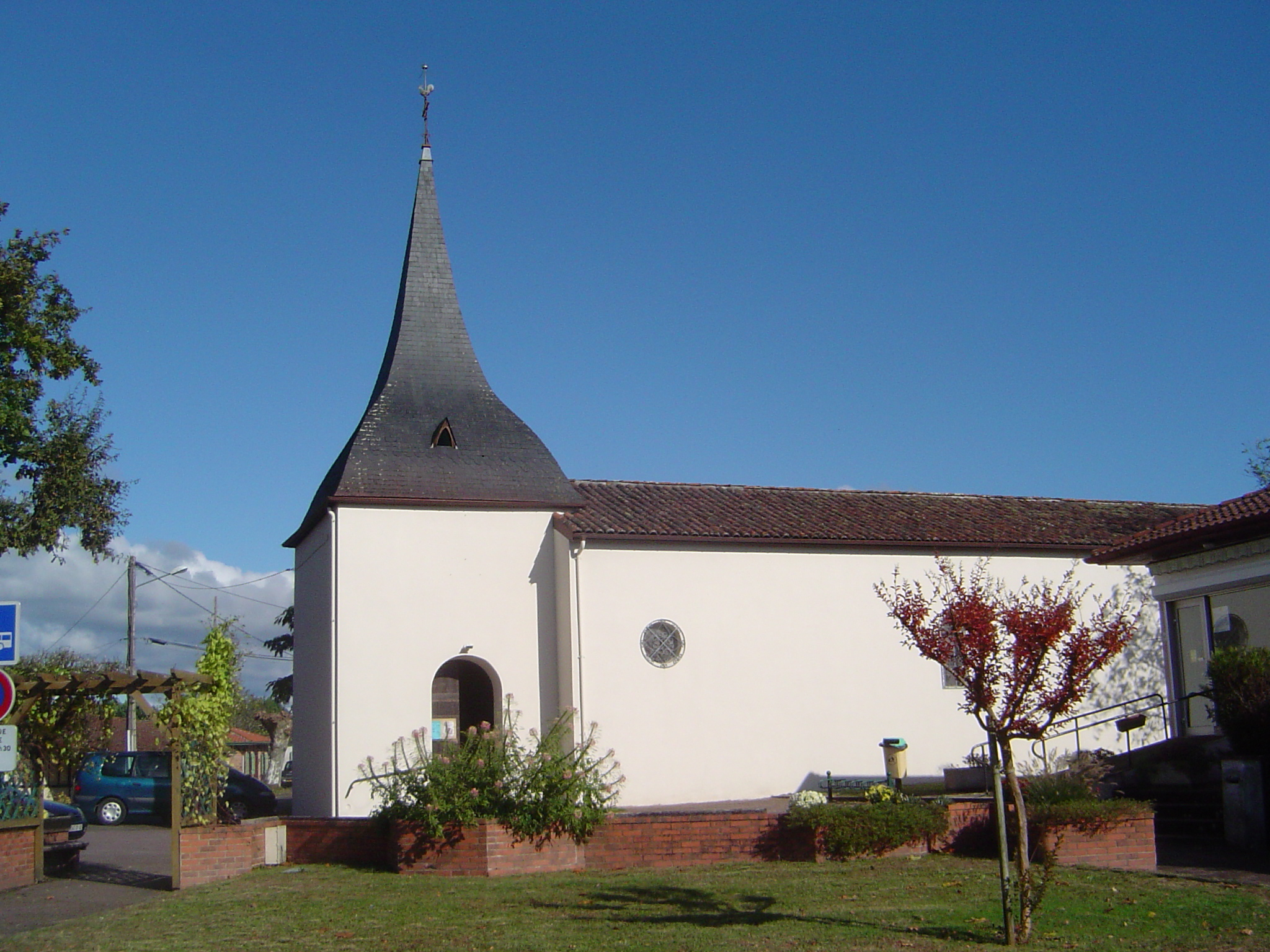 glèisa de St Joan de Vièla; Vièla-St-Gironç; Gasconha